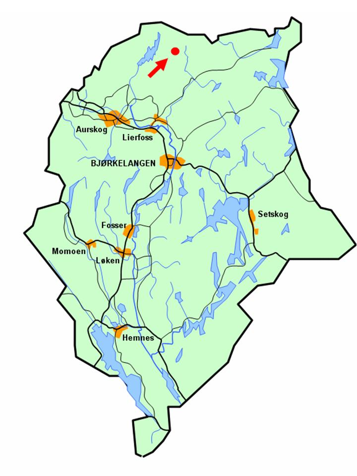 Stilisert kart som angir Åsnessetertjern sin lokalisering i Aurskog-Høland kommune.